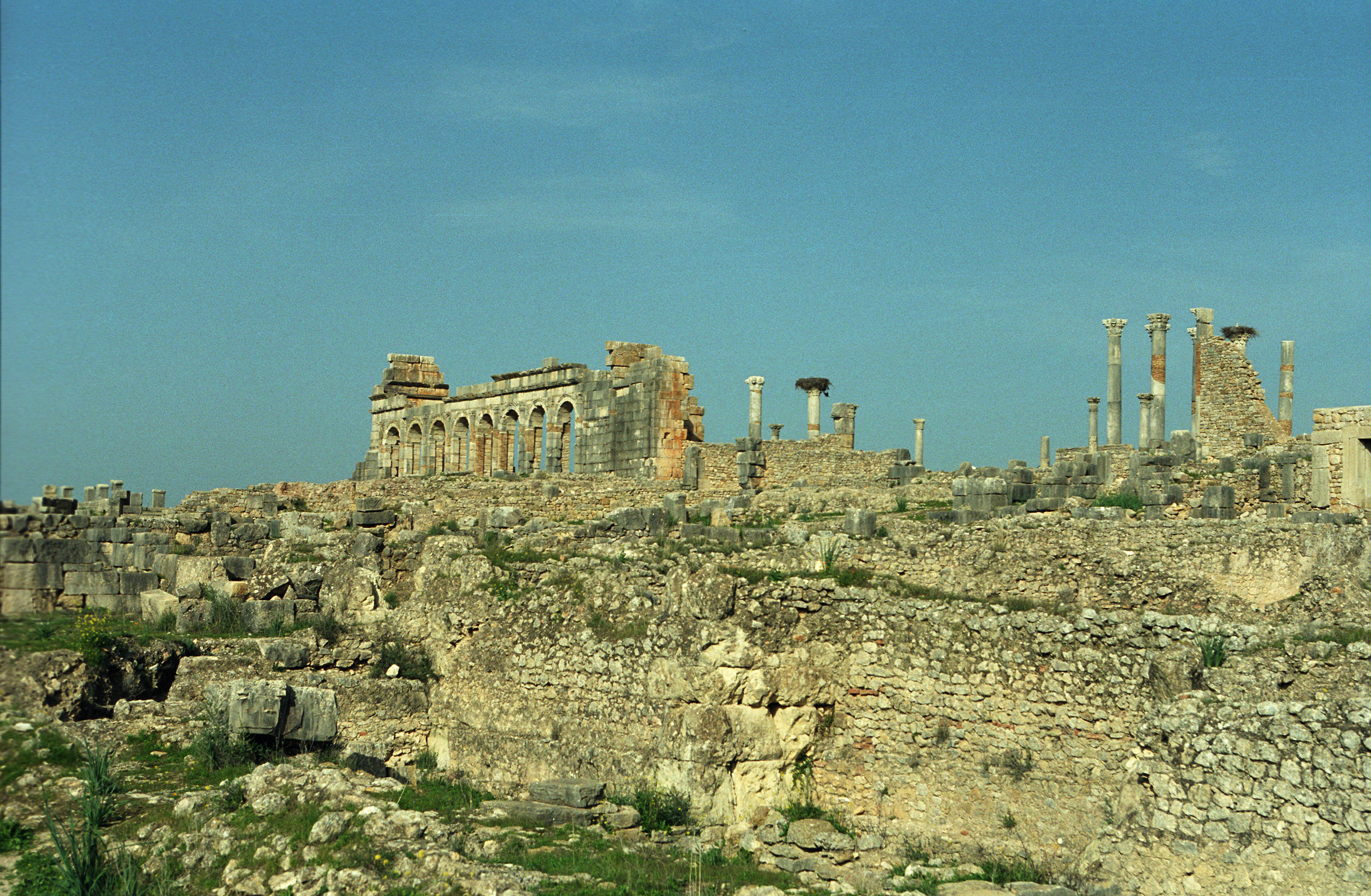 Volubilis, Marocco